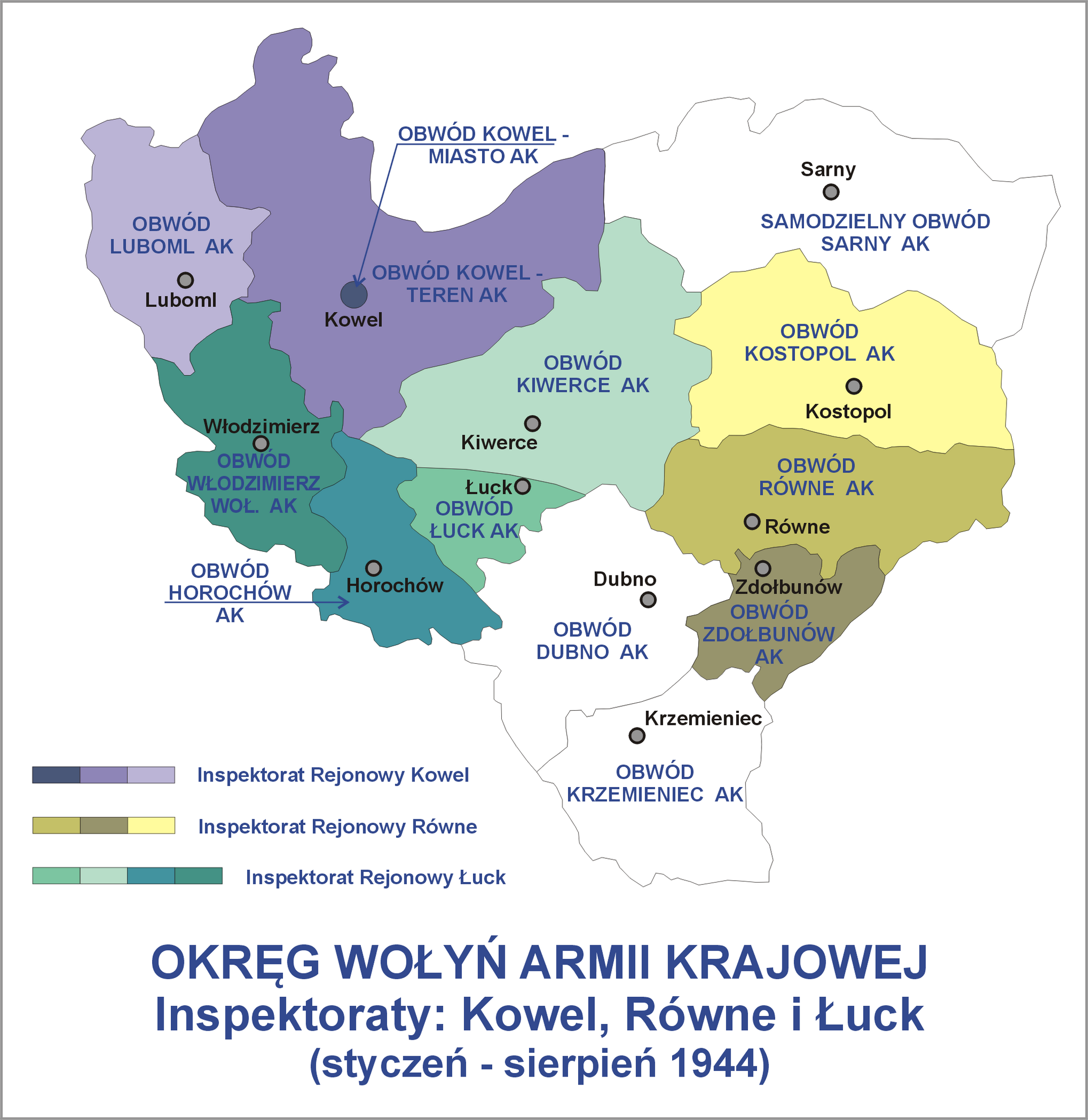 Okręg Wołyń Armii Krajowej - Inspektoraty: Kowel, Równe, Łuck (styczeń - sierpień 1944)